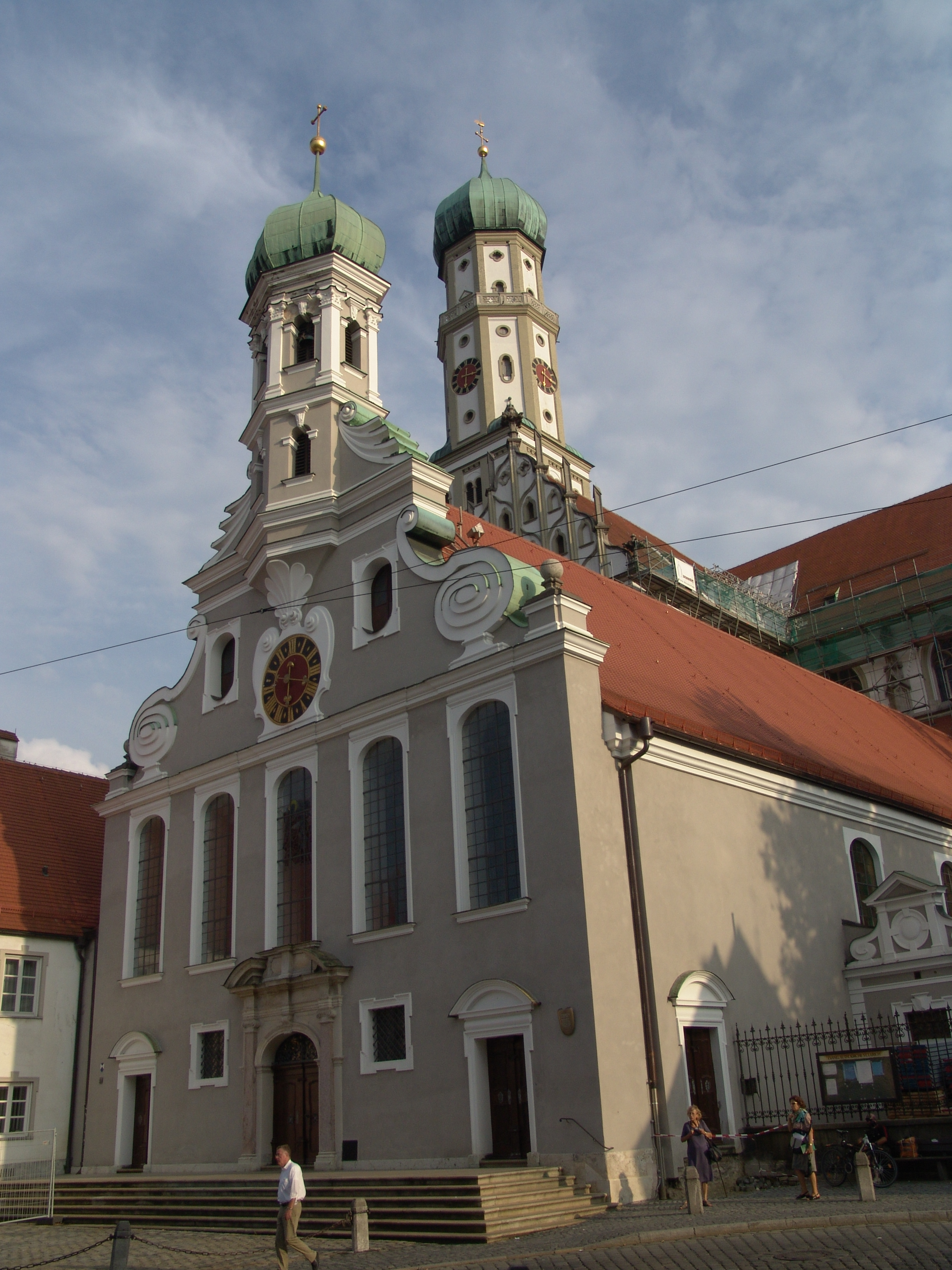 Lutheran St. Ulrich Church Augsburg